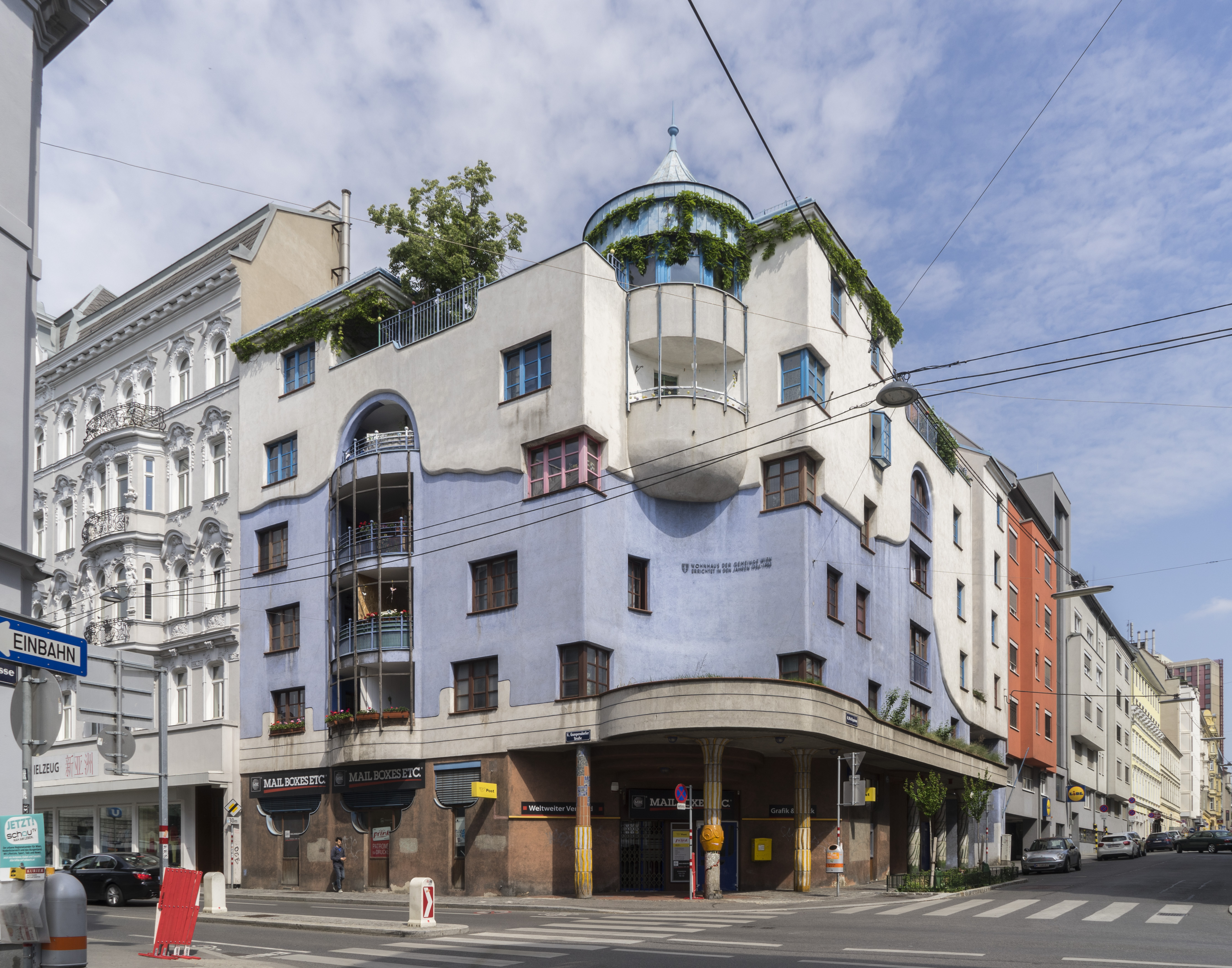 Wohnhausanlage Wallgasse 13 Peter Pelikan im Stil von Hundertwasser